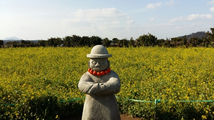 한국어 (조선): 돌하르방과 유채밭을 촬영함